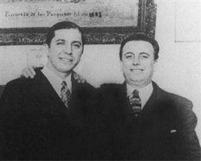 Juan Ruggero junto a Carlos Gardel, fotografía tomada en septiembre de 1933, en el local de Leales y Pampeanos